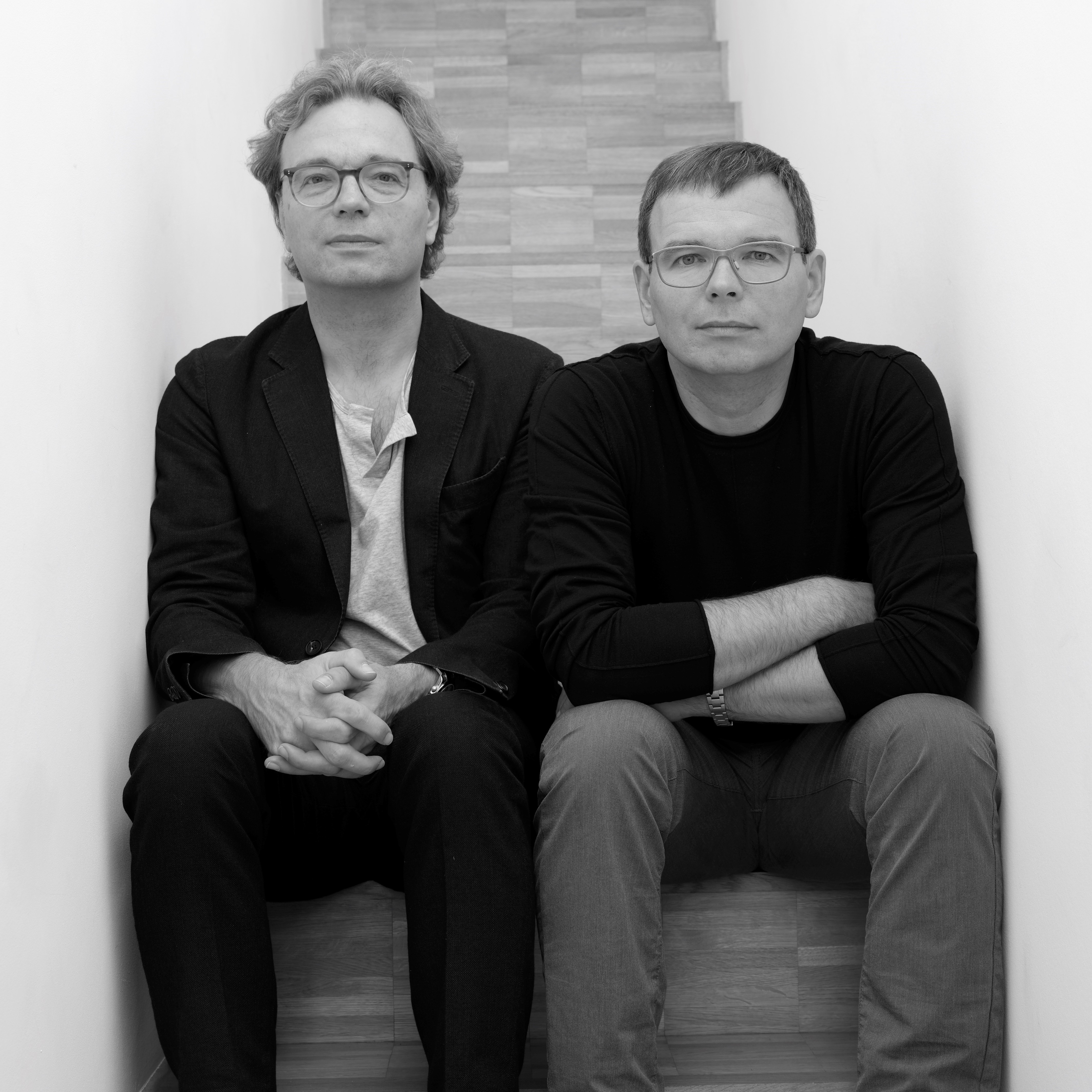 Ansgar und Benedikt Schulz (c) Valentina Seidel